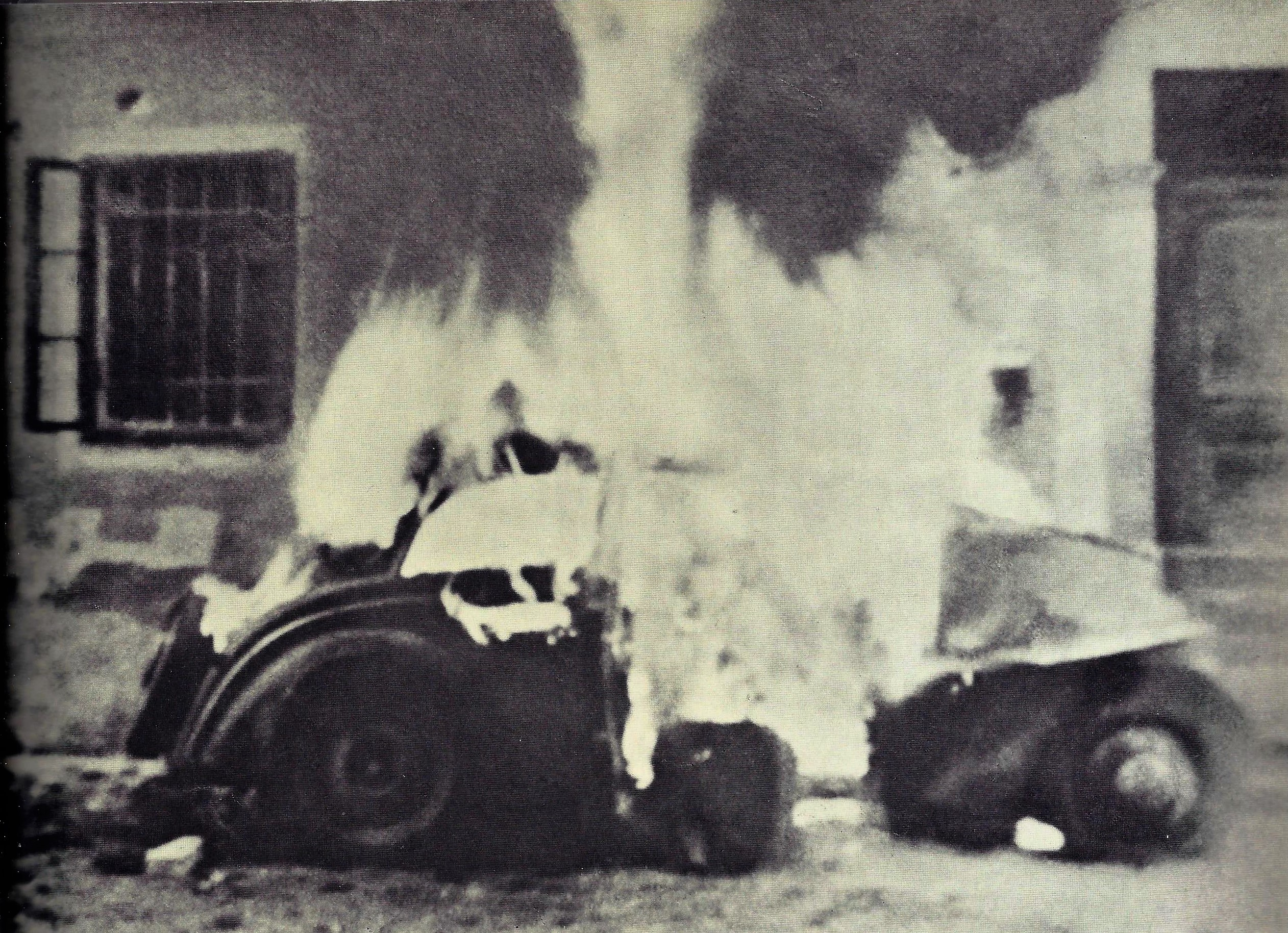 Goreči avtomobil poveljnika grohovske domobranske posadke